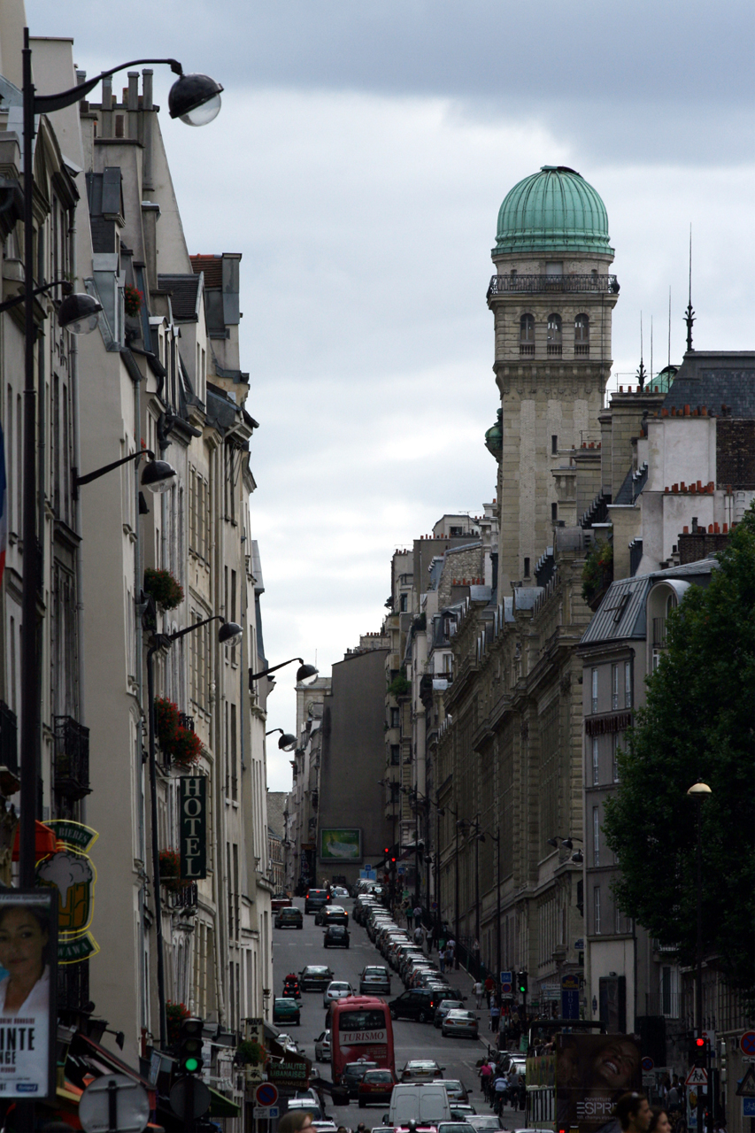 Observatoire de la Sorbonne Rue Saint-Jacques à Paris